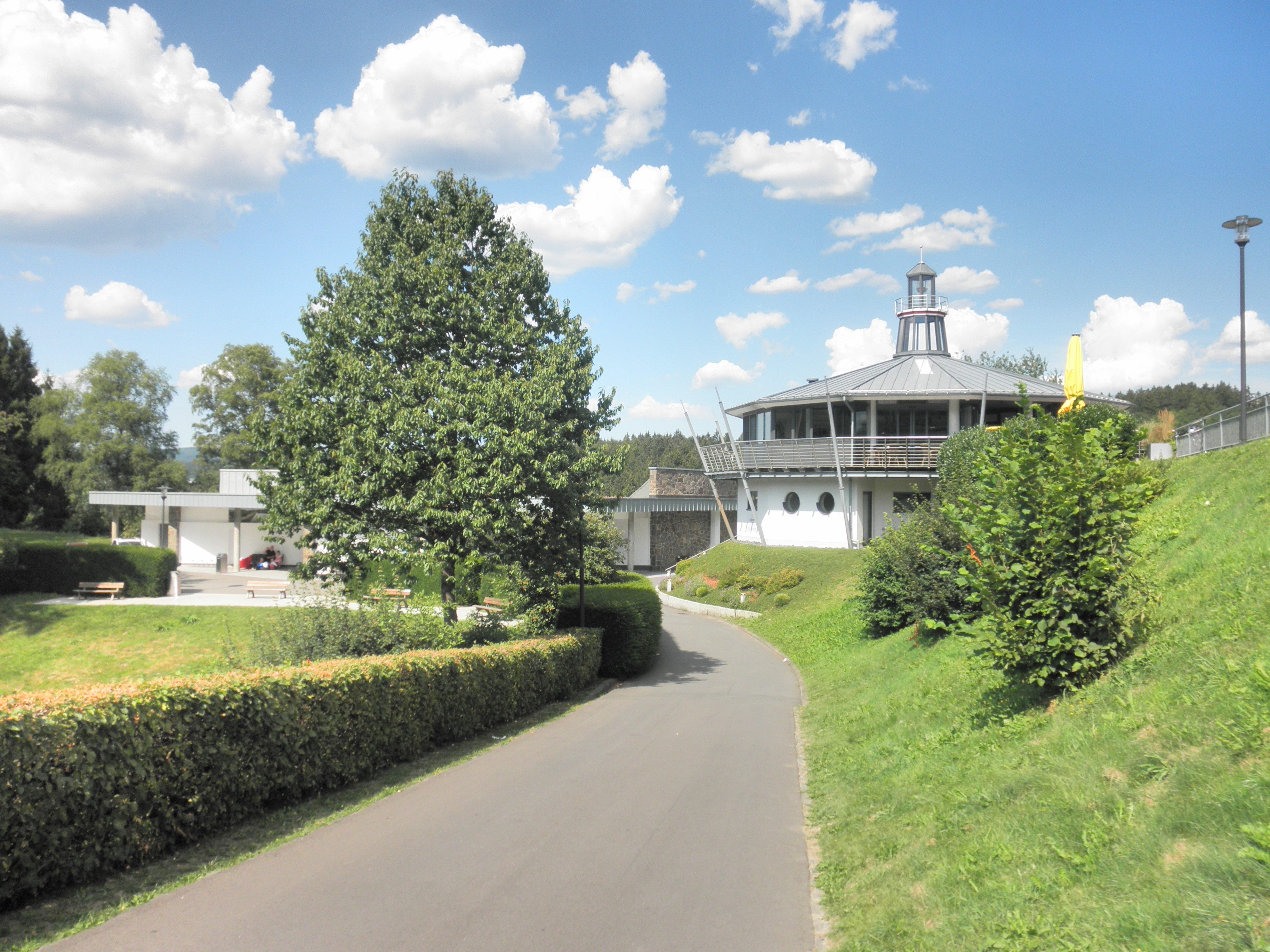 Bebauung des Talsperrendamms